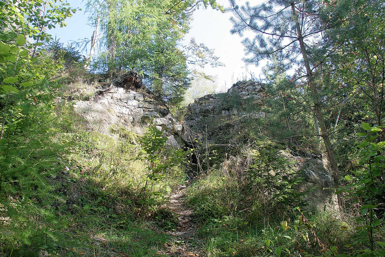 Ruine der Burg Karlsfried near Town Zittau in Sachsen, Germany autor: Prazak date: 22. 9. 2006